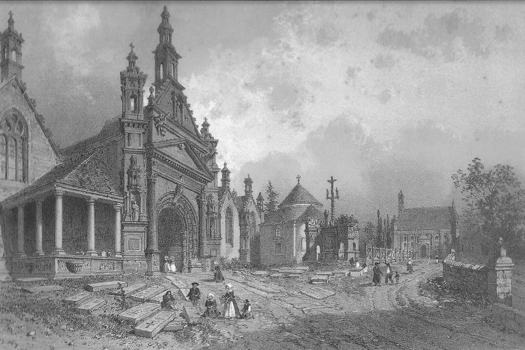 "Église et calvaire de Guimiliau" (dessin d'Eugène Cicéri, publié dans Félix Benoist, "La Bretagne contemporaine", tome "Finistère", 1867).